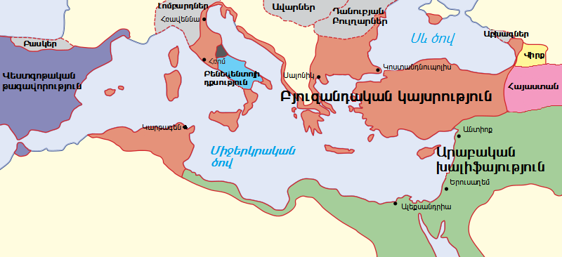 Բյուզանդական կայսրությունը 650 թ-ին